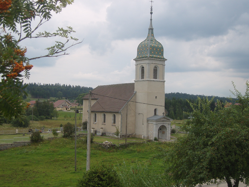 église de Malpas (Doubs, Franche-Comté, France).